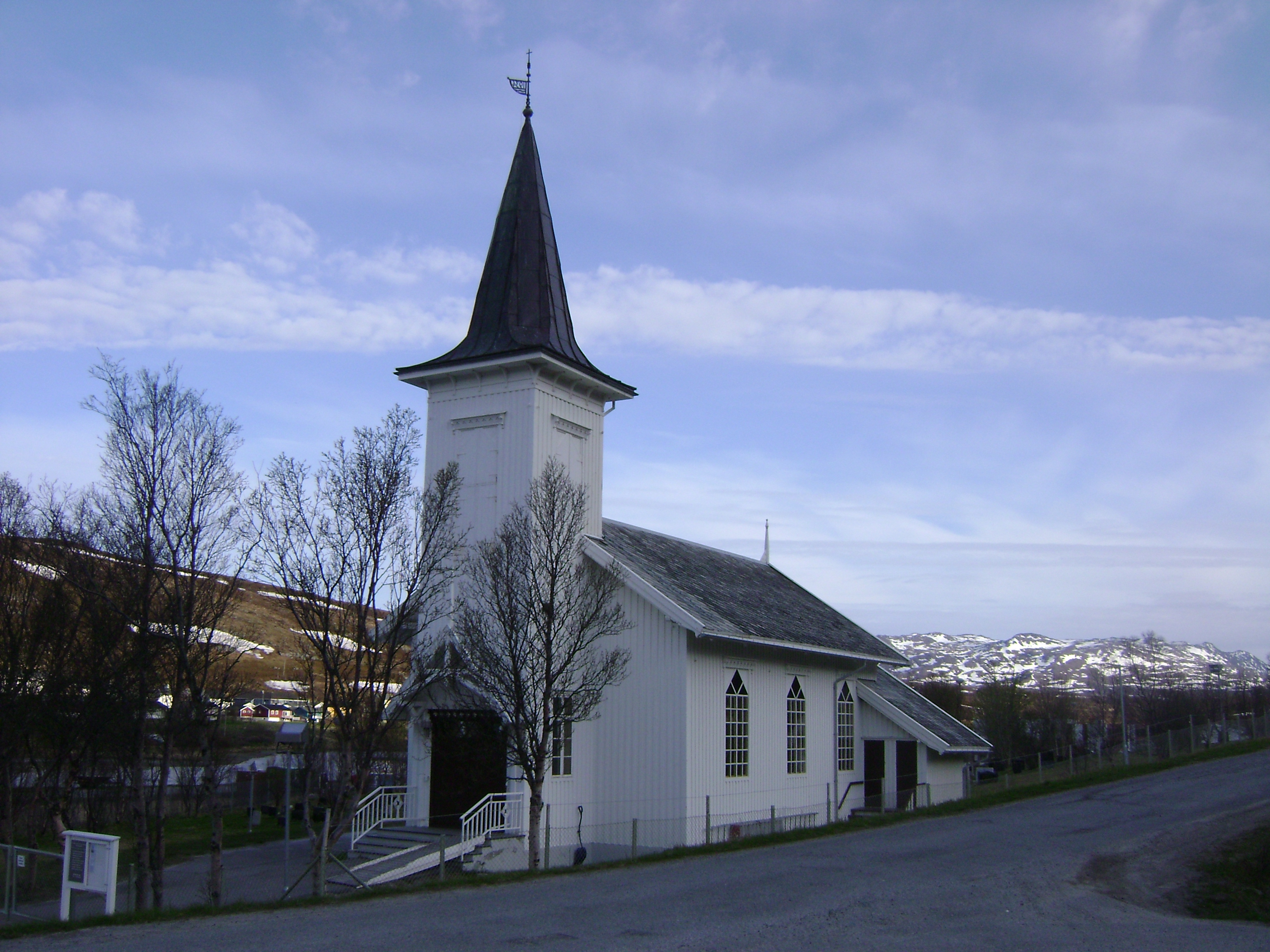 Kvalsund kirke i Kvalsund kommune, Finnmark. En av 5 kirker som overlevde Finnmarks nedbrenning i 1944.